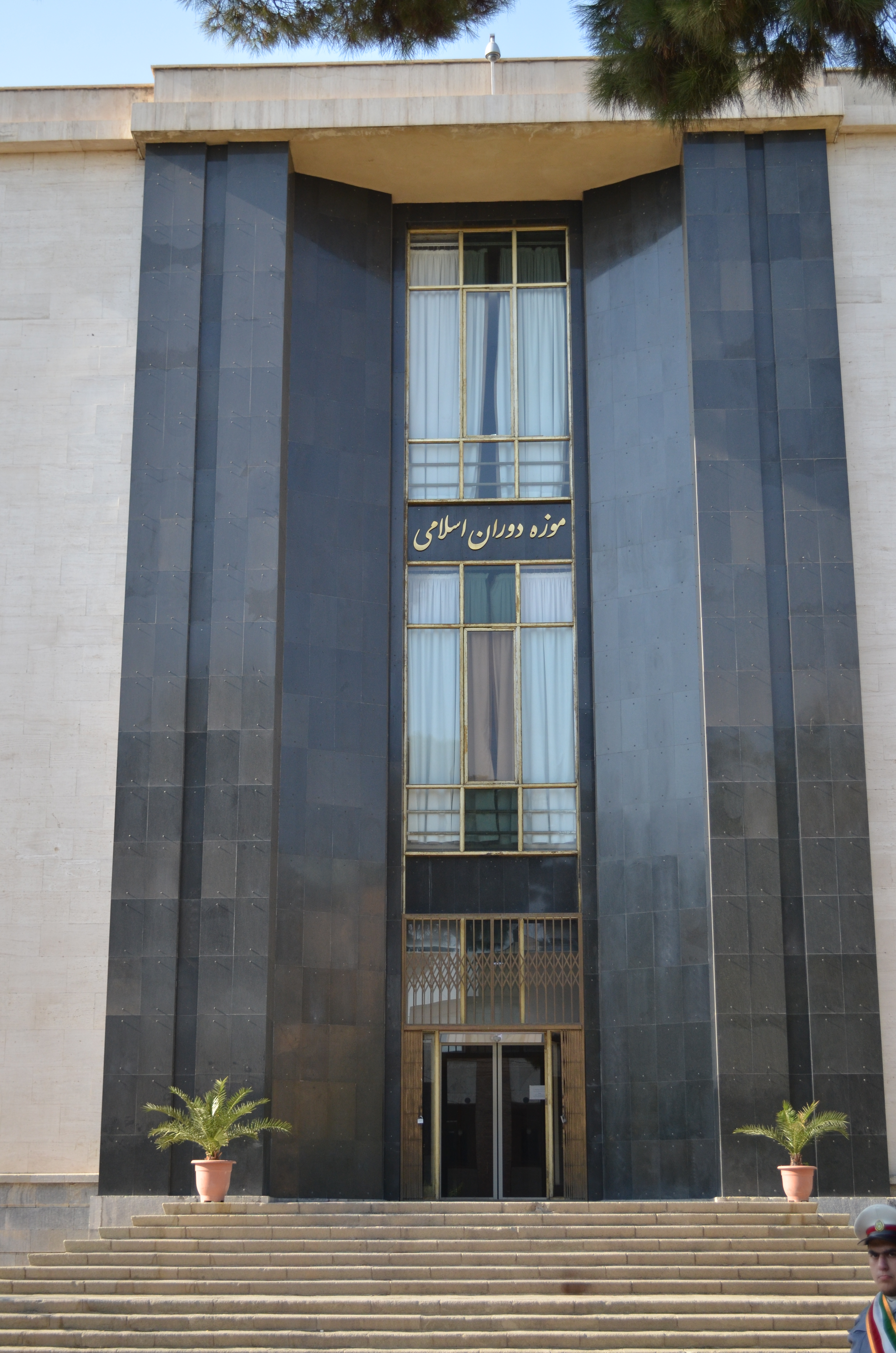 سردر موزهٔ دوران اسلامی